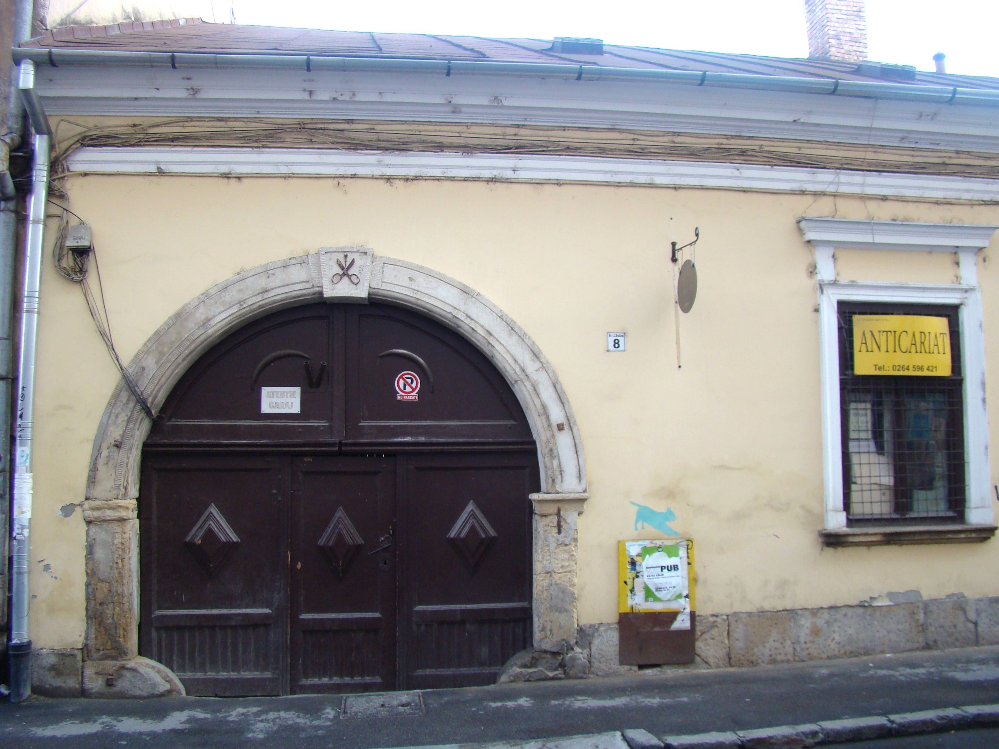 Casă monument strada I.C.Brătianu nr.8